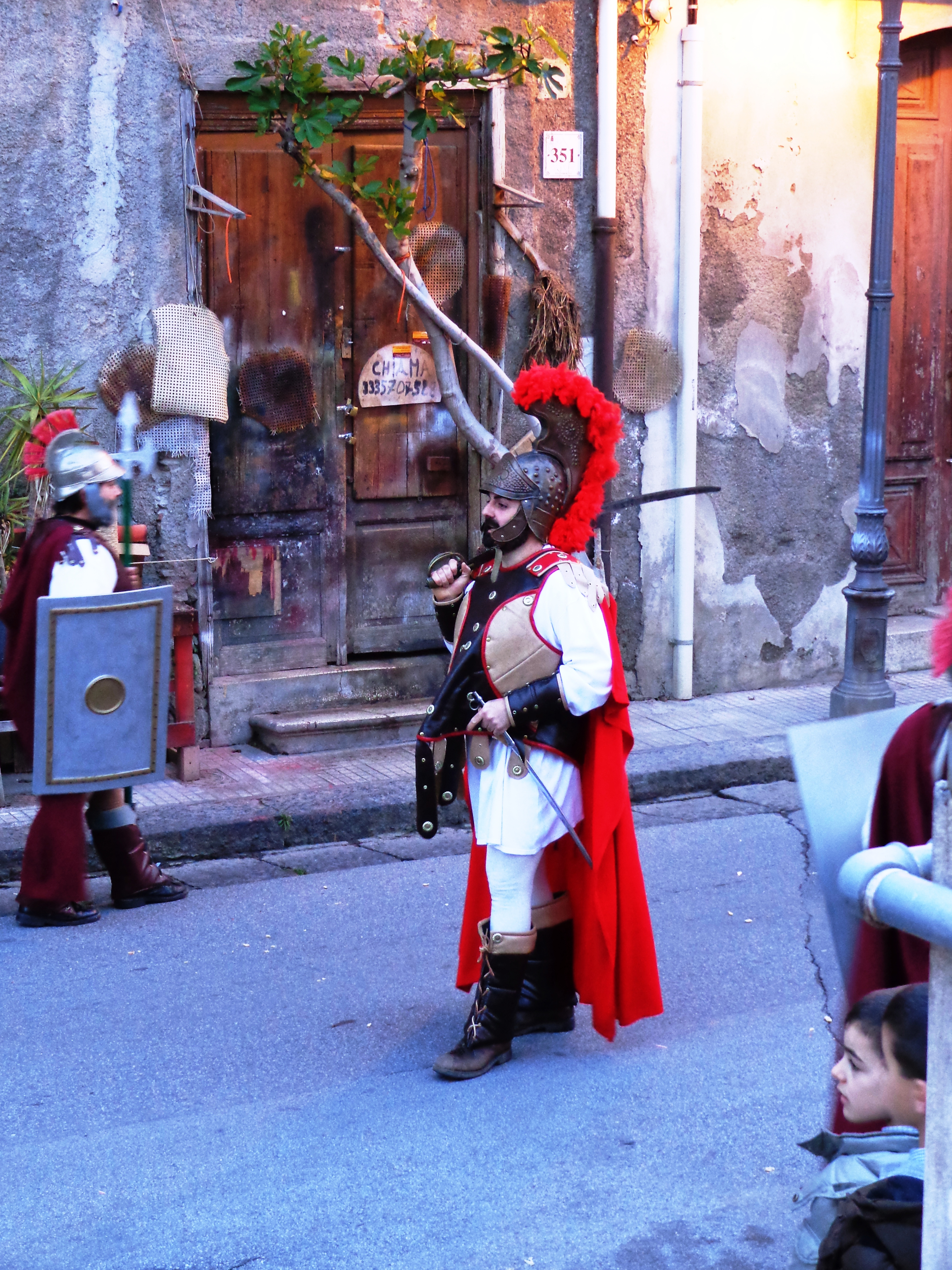 Comandante Giudei Barcellona Pozzo di Gotto